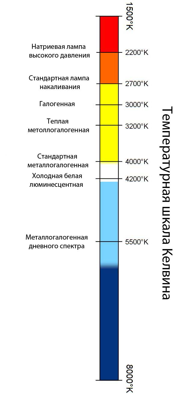 Цветовая температура различных источников света, используемых в растениеводстве